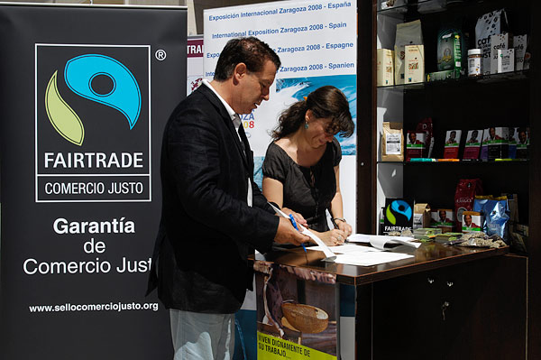 Firma de Convenio entre la Asociación del Sello FAIRTRADE-Comercio Justo y ExpoZaragoza. El Sello Fairtrade es el Sello que garantiza que un producto proviene de Comercio Justo